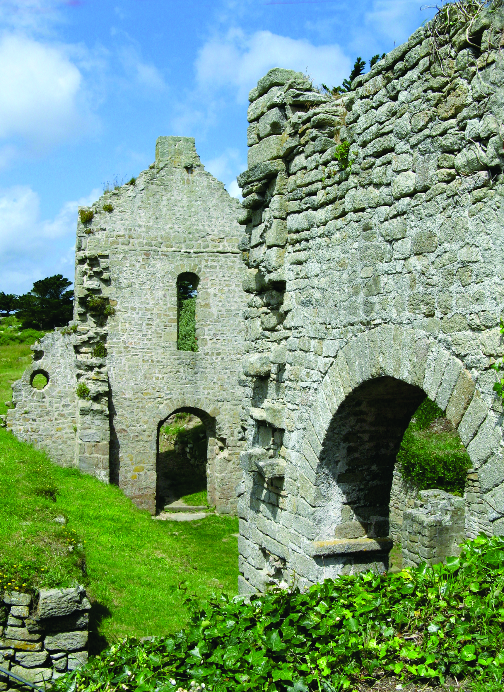 De Chapelle Sainte-Anne op het Île de Batz, Finistère, Bretagne. De ruïnes van deze romaanse kapel zijn in feite de restanten van een kerk (Sint-Pauluskerk), gebouwd in de Xe eeuw op de plaats van een door de Noormannen verwoeste abdij.